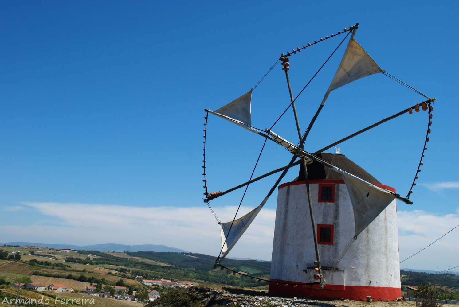 Moinho do Boneco, situado em Moita dos Ferreiros, concelho da Lourinhã, um dos exemplares representativos do Oeste de Portugal.